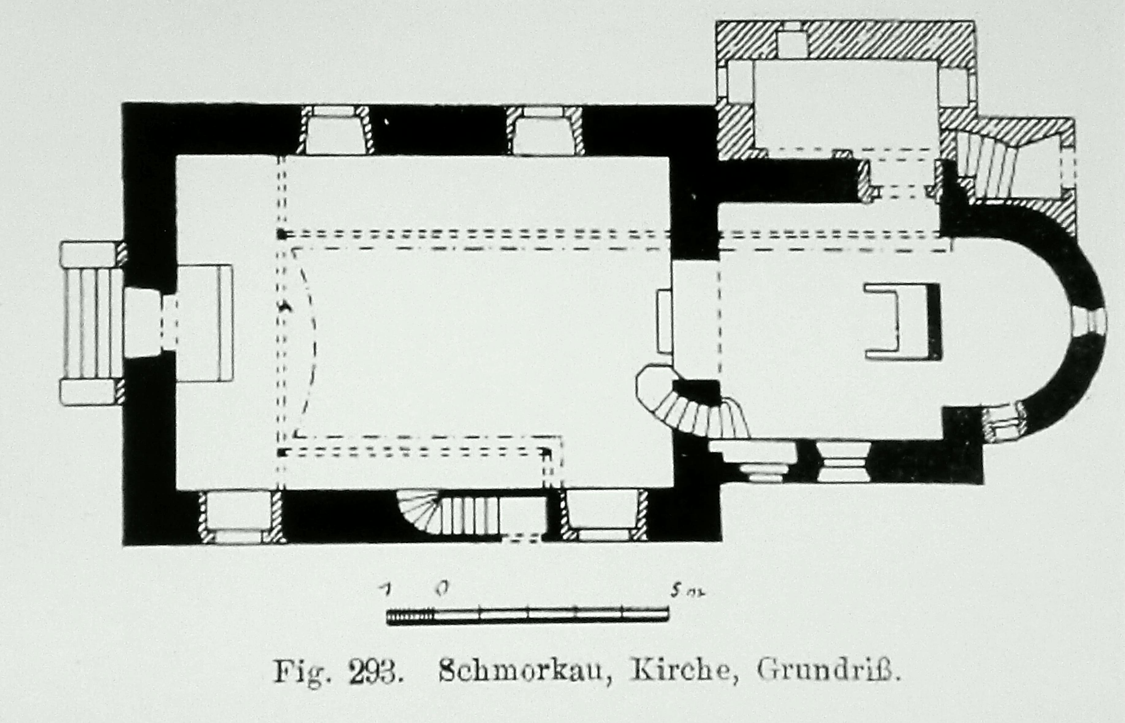 Kirche Schmorkau bei Oschatz: Grundriss. Aus: Bau und Kunstdenkmäler des Königreiches Sachsen, Heft 28, Amthauptmannschaft Oschatz, bearbeitet von Cornelius Gurlitt, Verlag Meinhold und Söhne 1910, S. 272. online